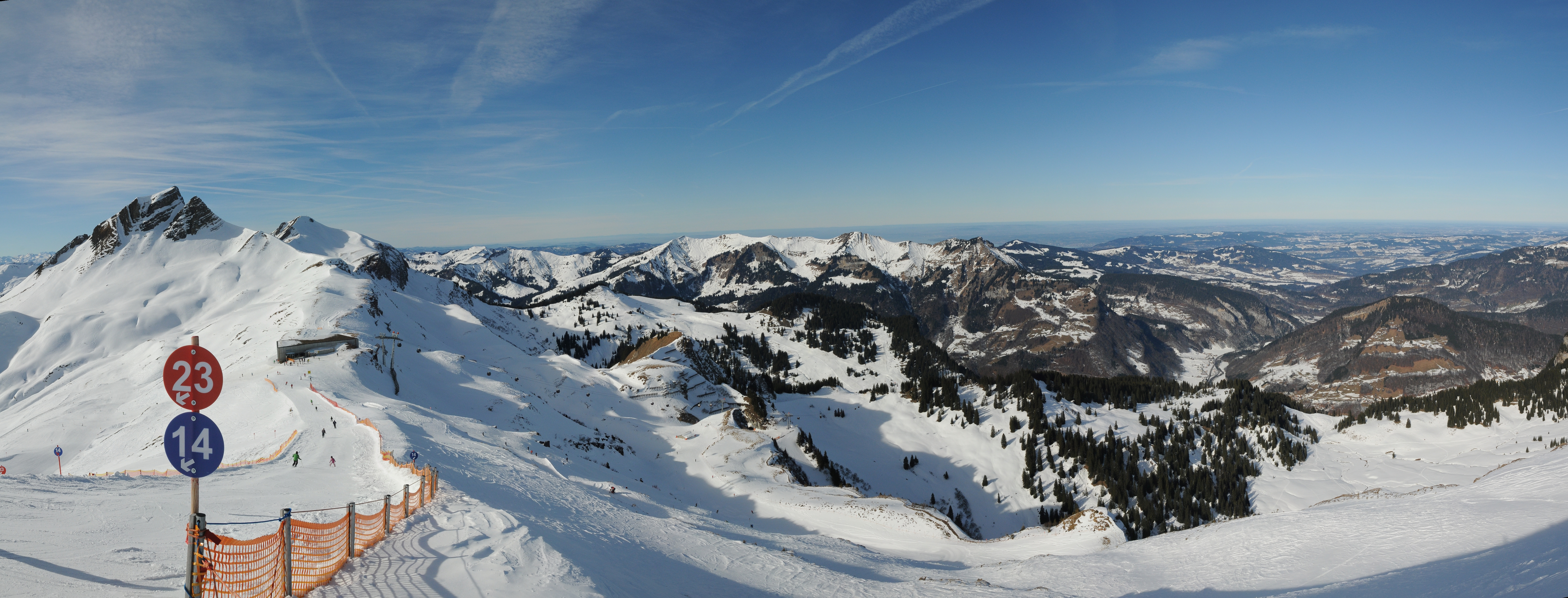 Panorama aus mehreren Vertikalbilder: Blick vom 2510m hohen Wannenkopf auf die Damülser Mittagsspitze, die Gipfelbahn und den Skitunnel der die beiden Skigebiete Damüls, Mellau verbindet.